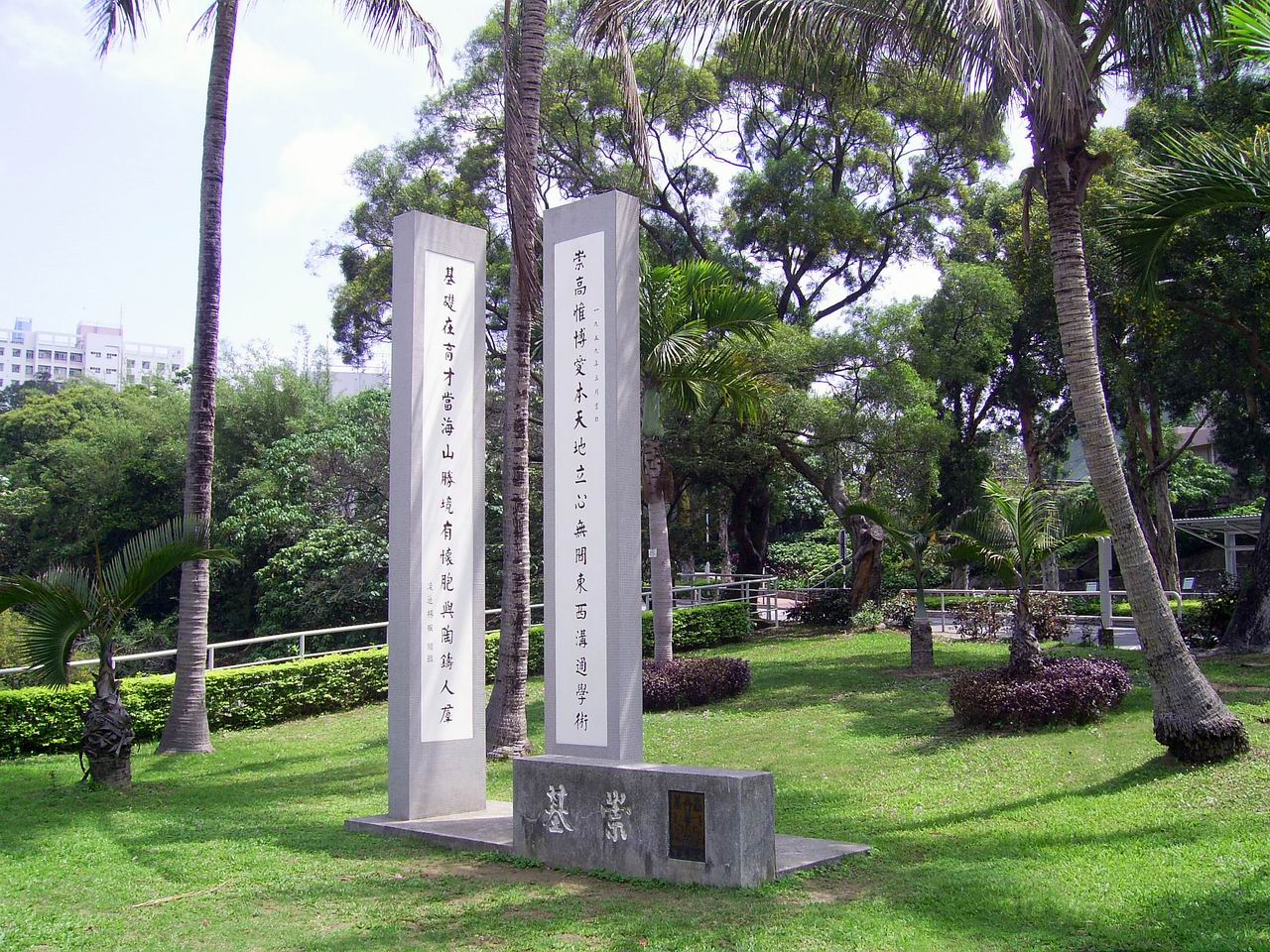 原崇基門的楹聯